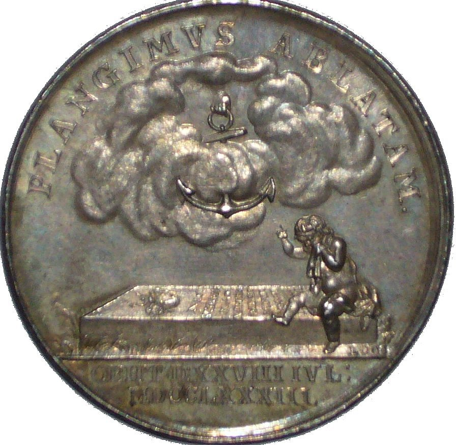 Die Rückseite des Bürgermeisterpfennig zu Ehren Nicolaus Schuback († 28. Juli 1783). Siehe Otto Christian Gaedechens, Begräbnismünze Nr. 7, Verein für Hamburgische Geschichte (Hrsg.): Hamburgische Münzen und Medaillen, Verlag Johann August Meissner, Hamburg, 1850, S. 57, (online)